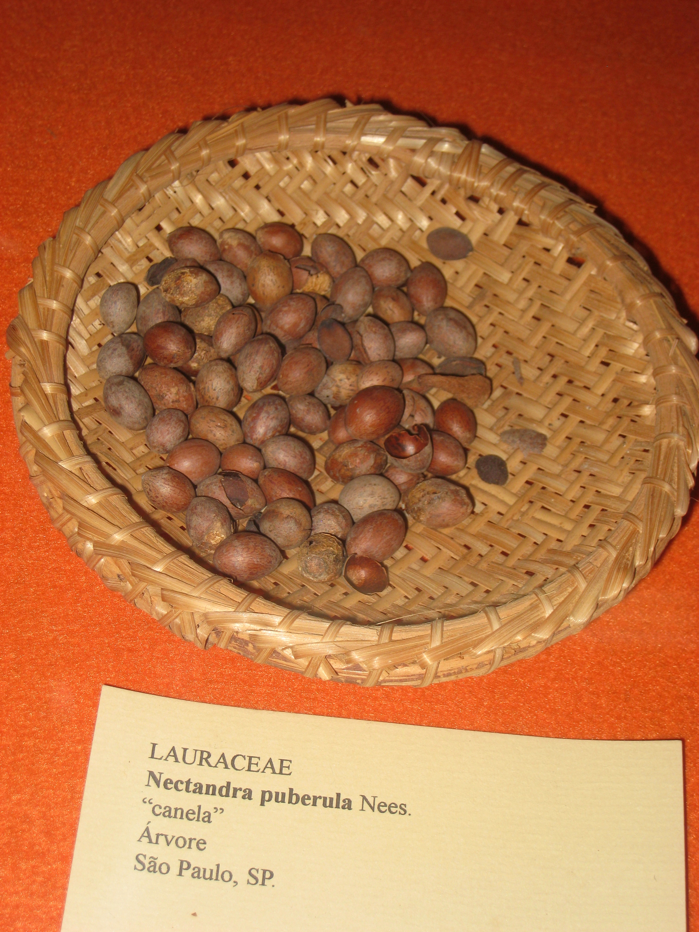 Nectandra puberula specimen in the Museu Botânico Dr. João Barbosa Rodrigues, Jardim Botânico de São Paulo, São Paulo City, SP, Brazil.